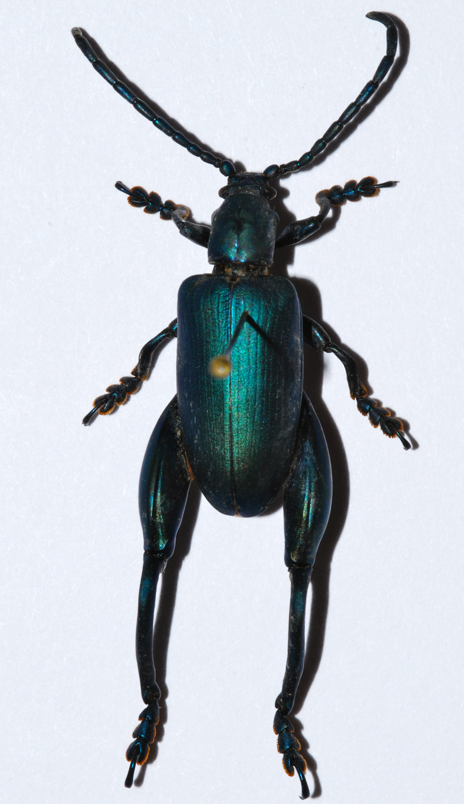 Antsiranana, MADAGASCAR